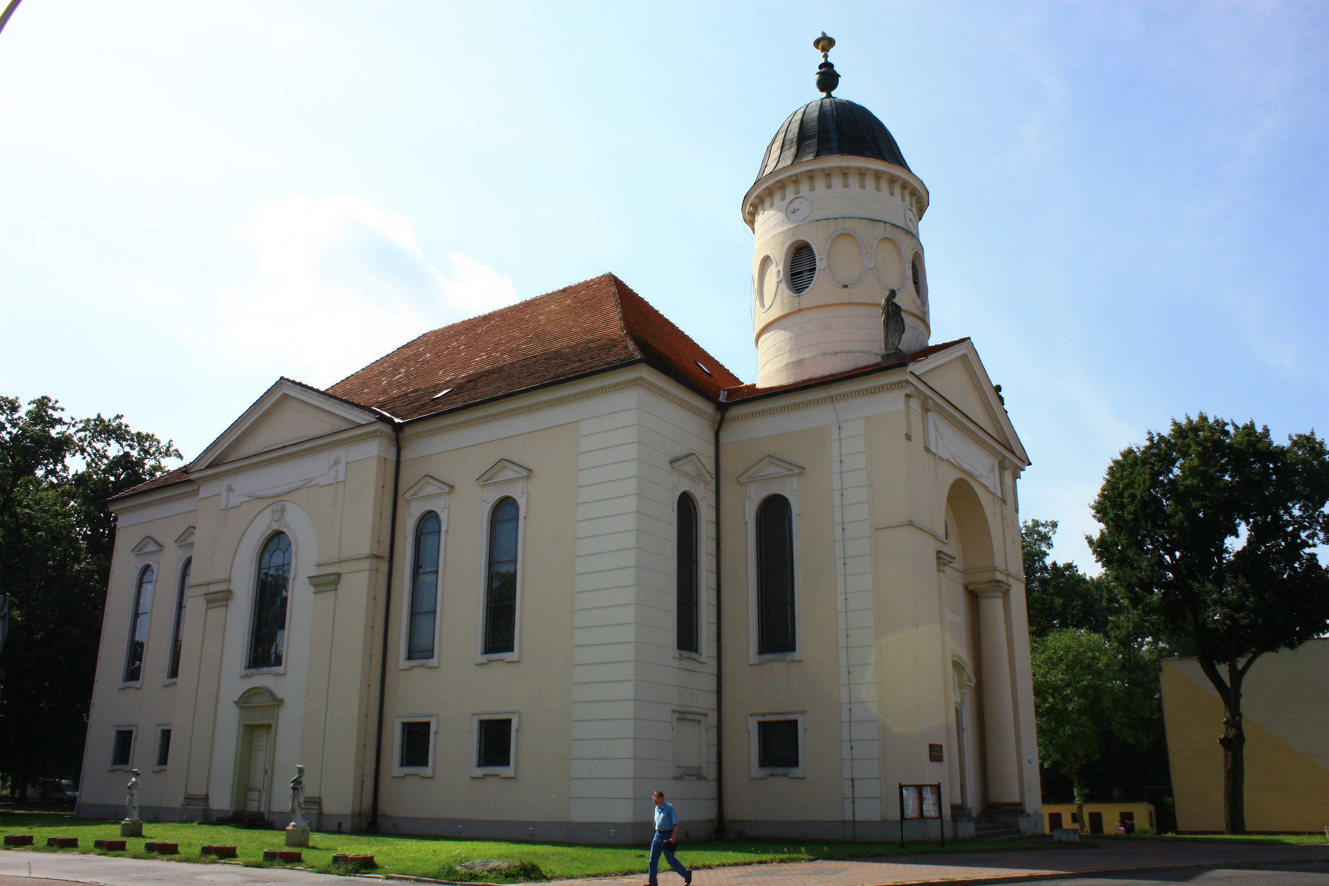 Syców, kościół ewangelicki, 1785-1789